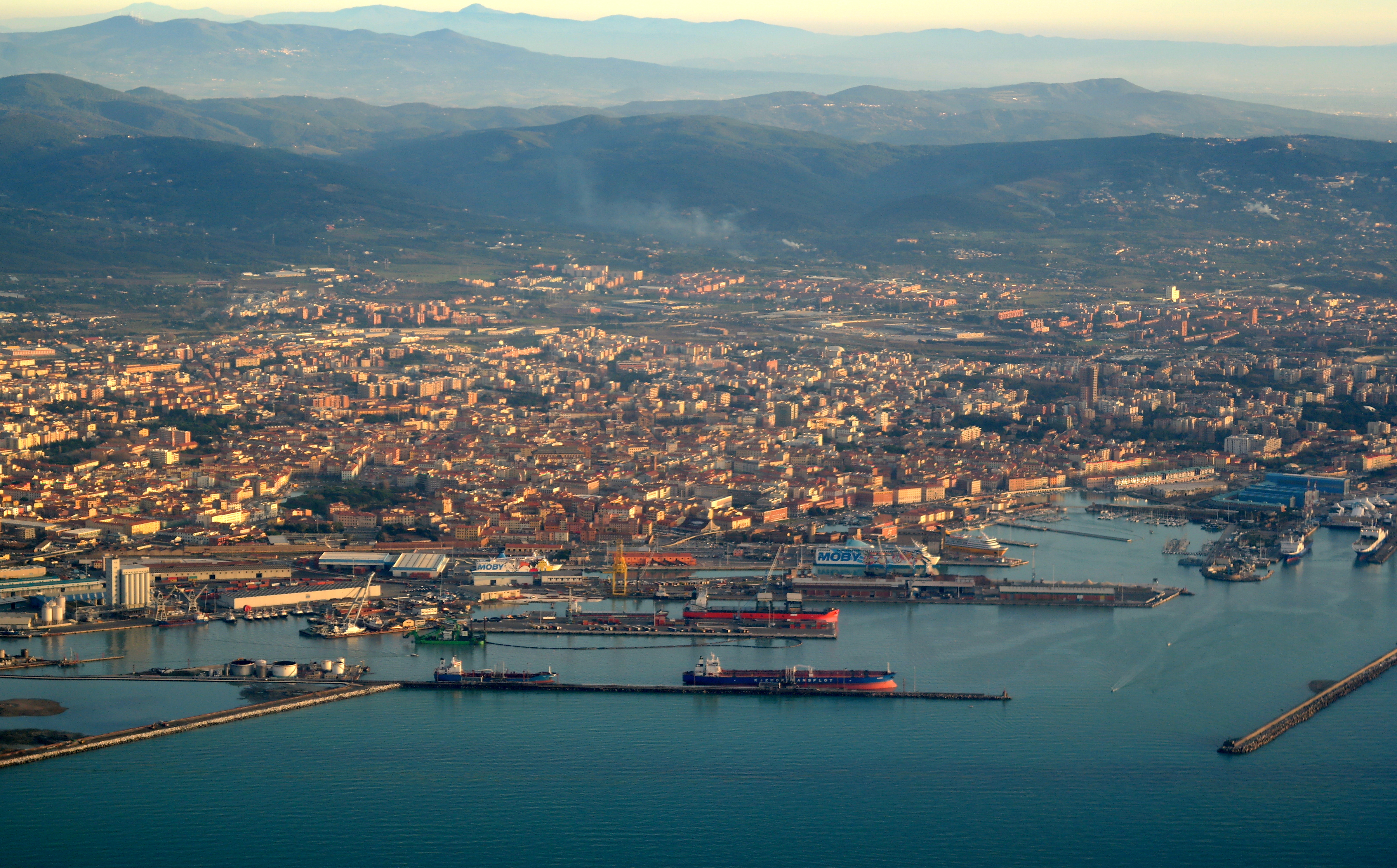 Veduta aerea di Livorno